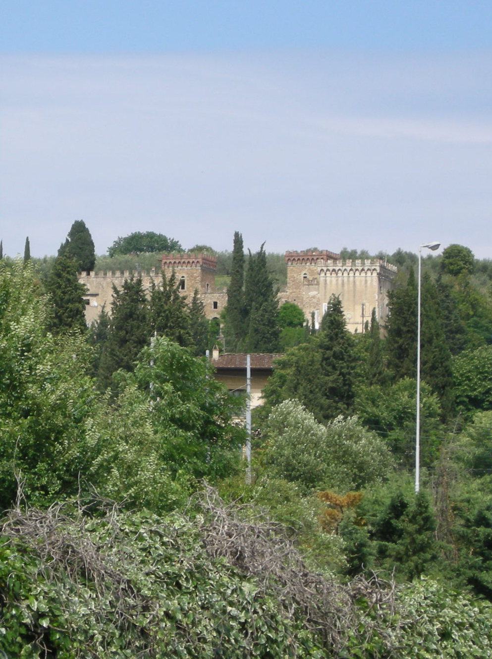 Il loretino